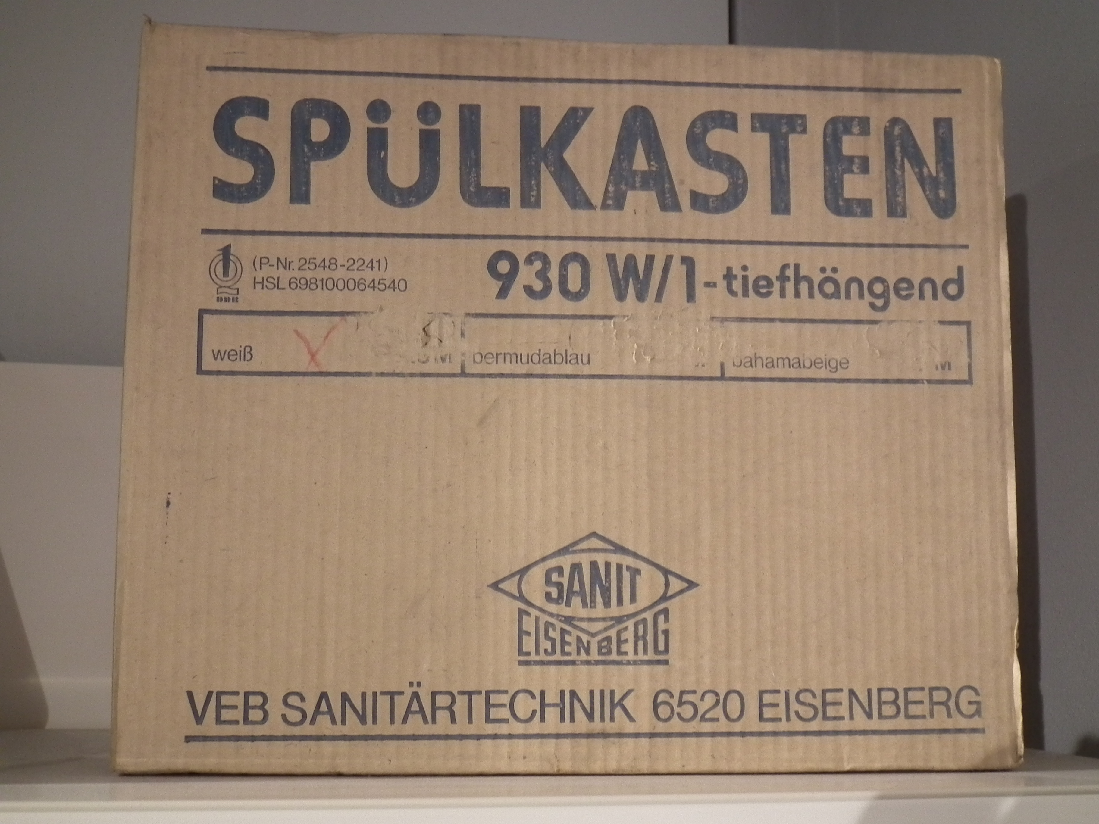 Dresden - Die Welt der DDR